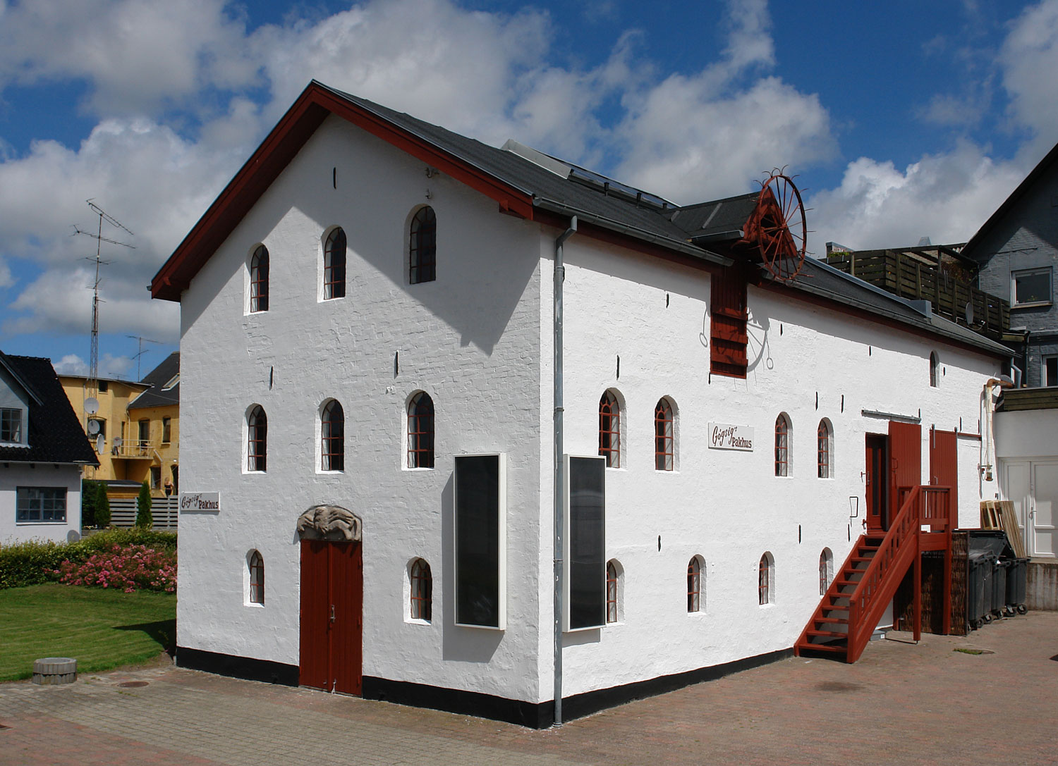 Sindal: das Kulturhaus „Gøgsigs Pakhus“ gehörte zu dem alten Kaufladen, der um 1900 gebaut wurde und wird jetzt für Ausstellungen genutzt